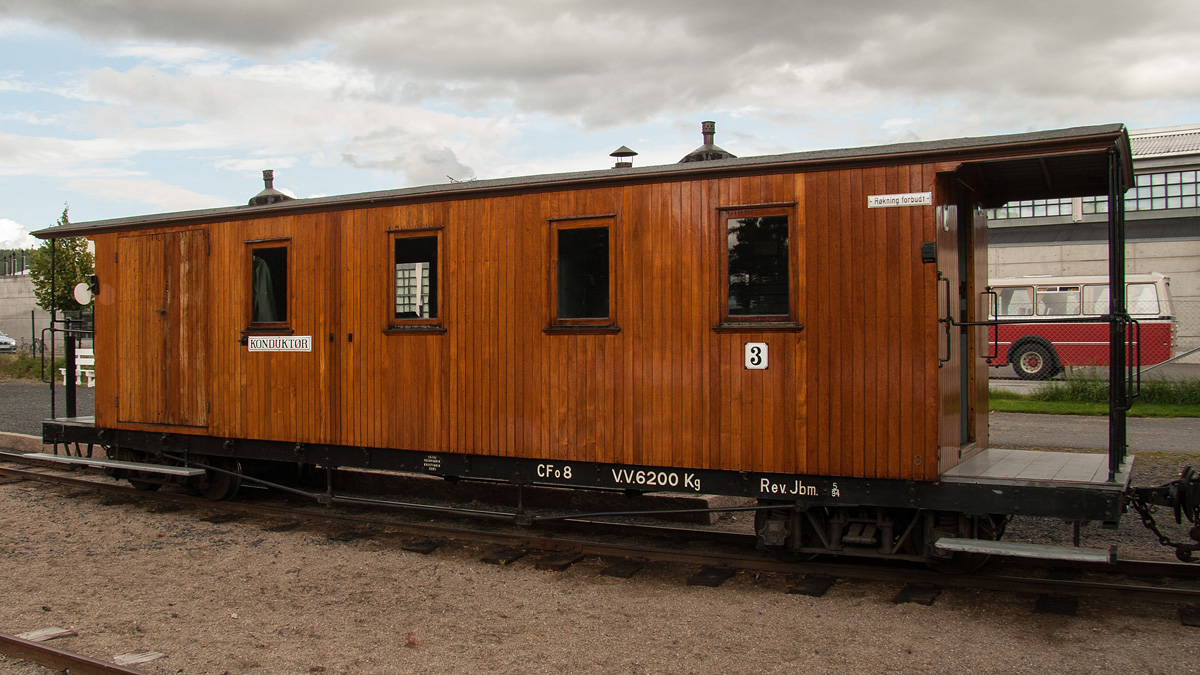 3.-klasse- og konduktørvogna CFo 8 ble opprinnelig levert til Nesttun–Osbanen i 1895. Etter at banen ble lagt ned i 1935 ble vogna solgt til Urskog–Hølandsbanen (UHB) og ble med over i NSB i 1945. Da også UHB ble lagt ned i 1960 ble vogna gitt til Norsk jernbanemuseum på Hamar, hvor den benyttes i «Tertittoget».